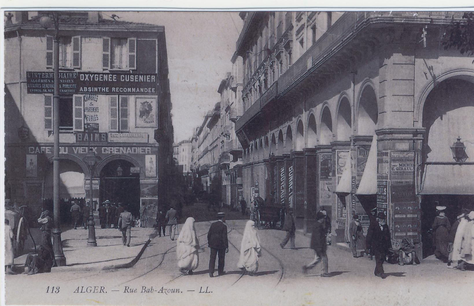 Affiche annonçant la conférence de Louise Michel et E. Girault au Petit Athénée le 20 octobre 1904.